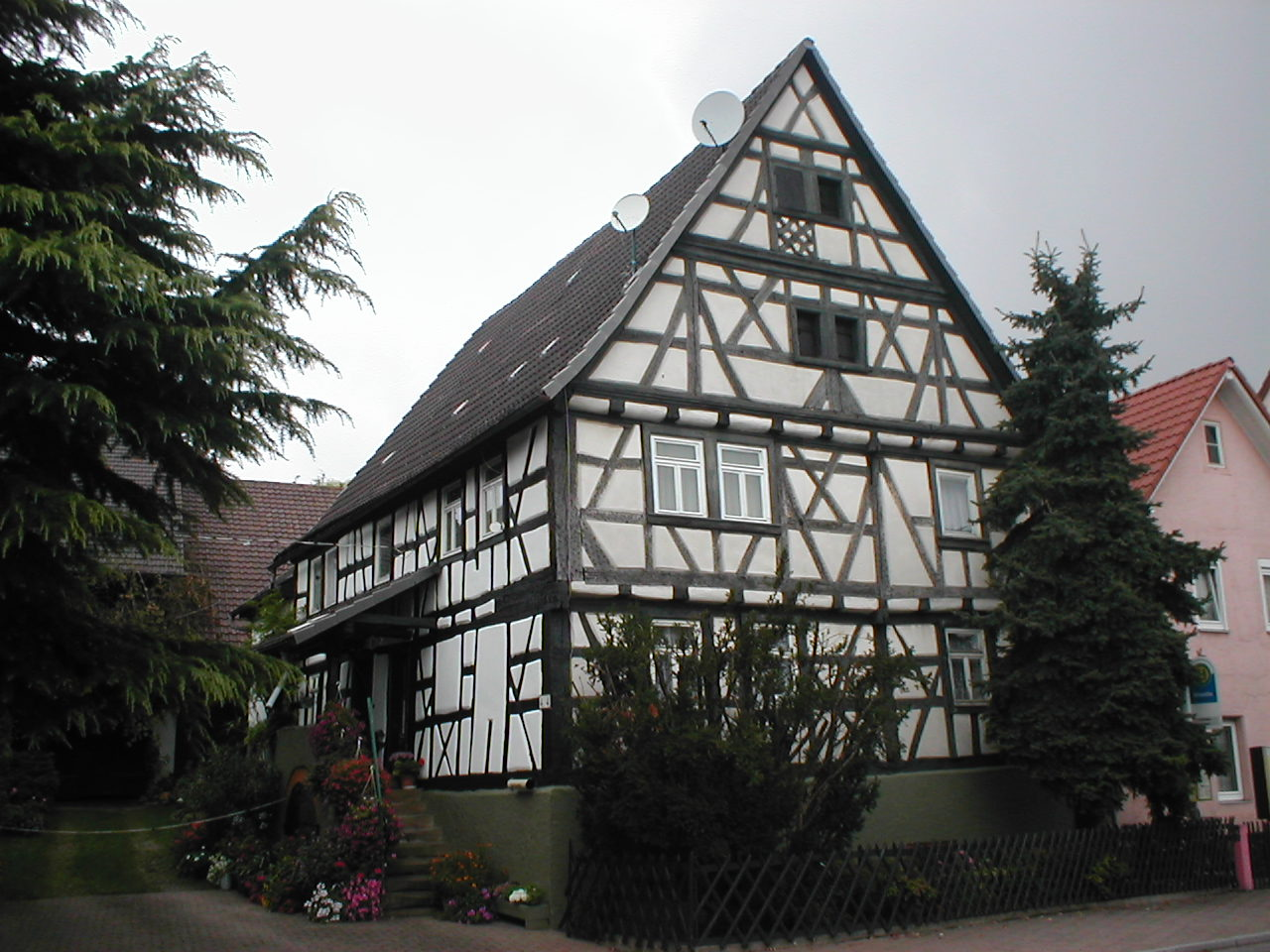 Historisches Fachwerkgebäude in der Hauptstraße 44, Kirchardt